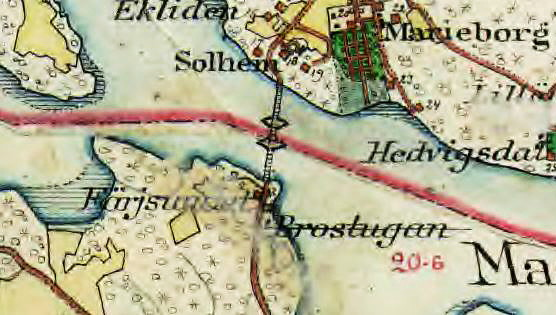 Flottbron (Ågestabron) med Brostugan (alt. Färjsundet) på Häradsekonomiska kartan